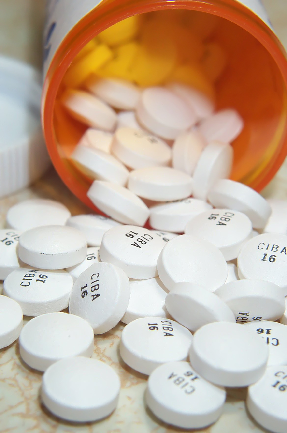 Ritalin